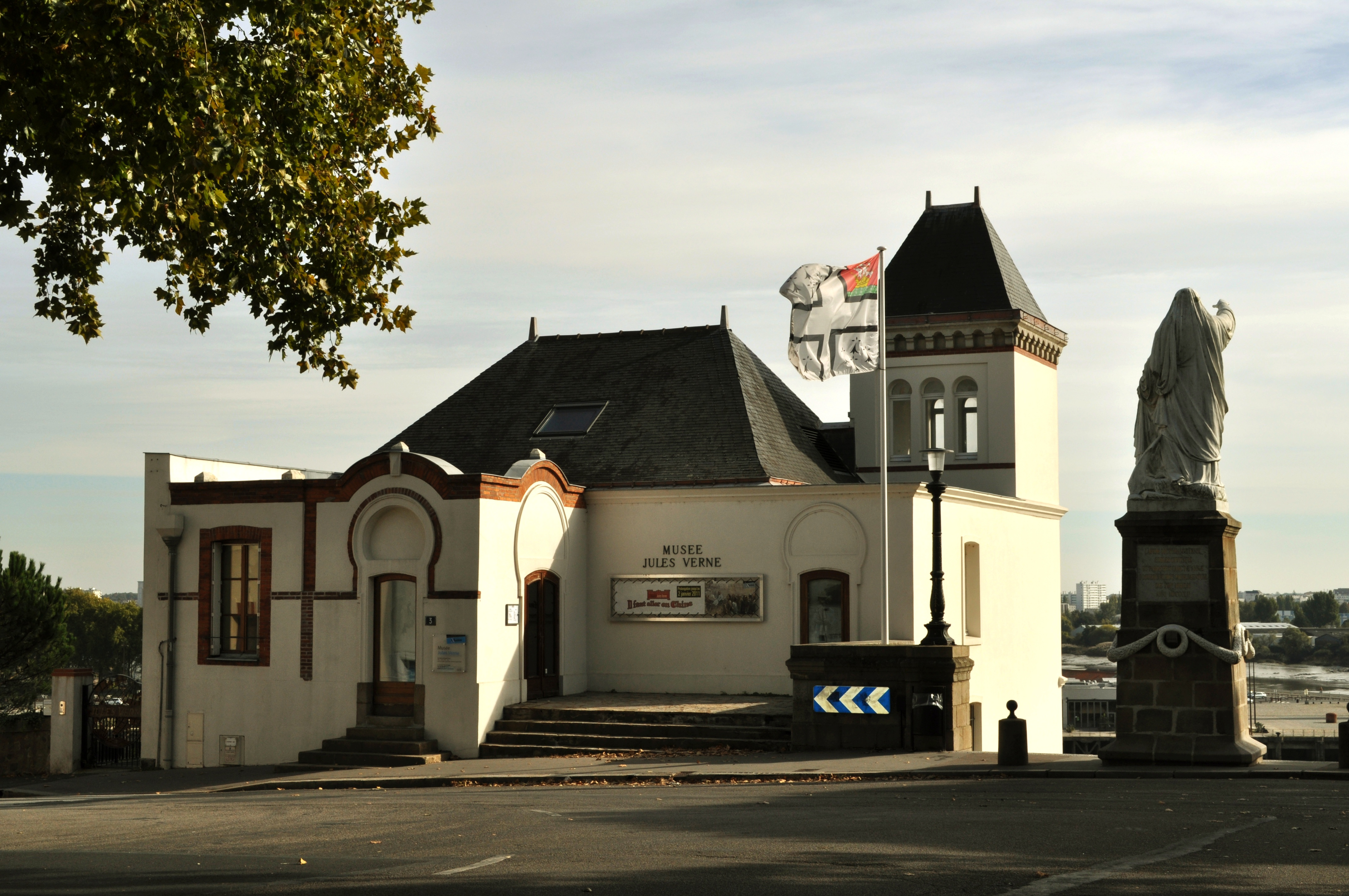 Mirdi Jules Verne e Naoned.